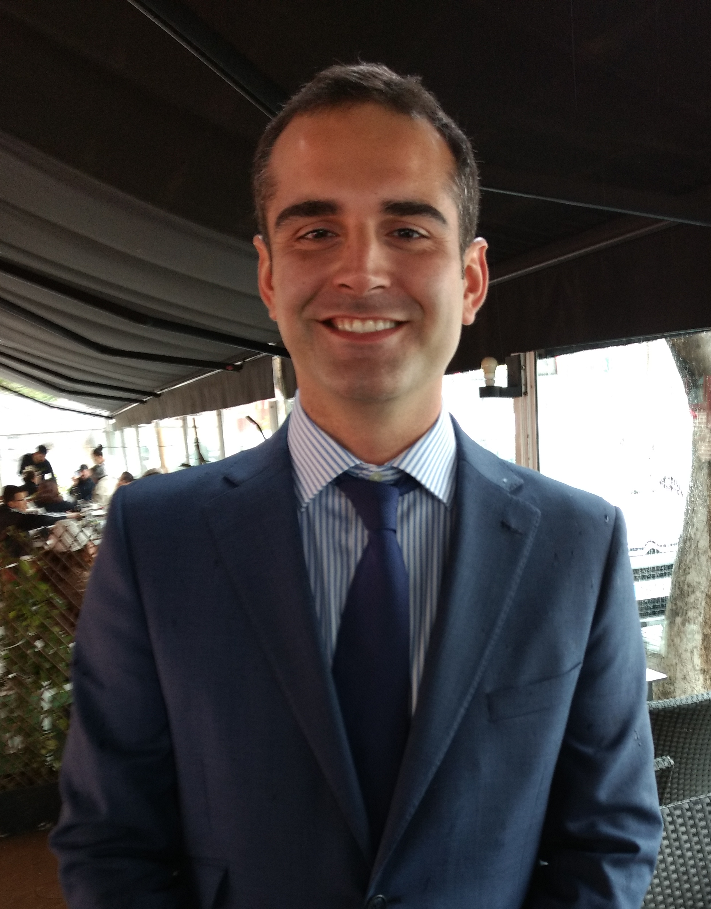 Retrato del actual alcalde de Almería durante una rueda de prensa en un exótico día de lluvia en la ciudad